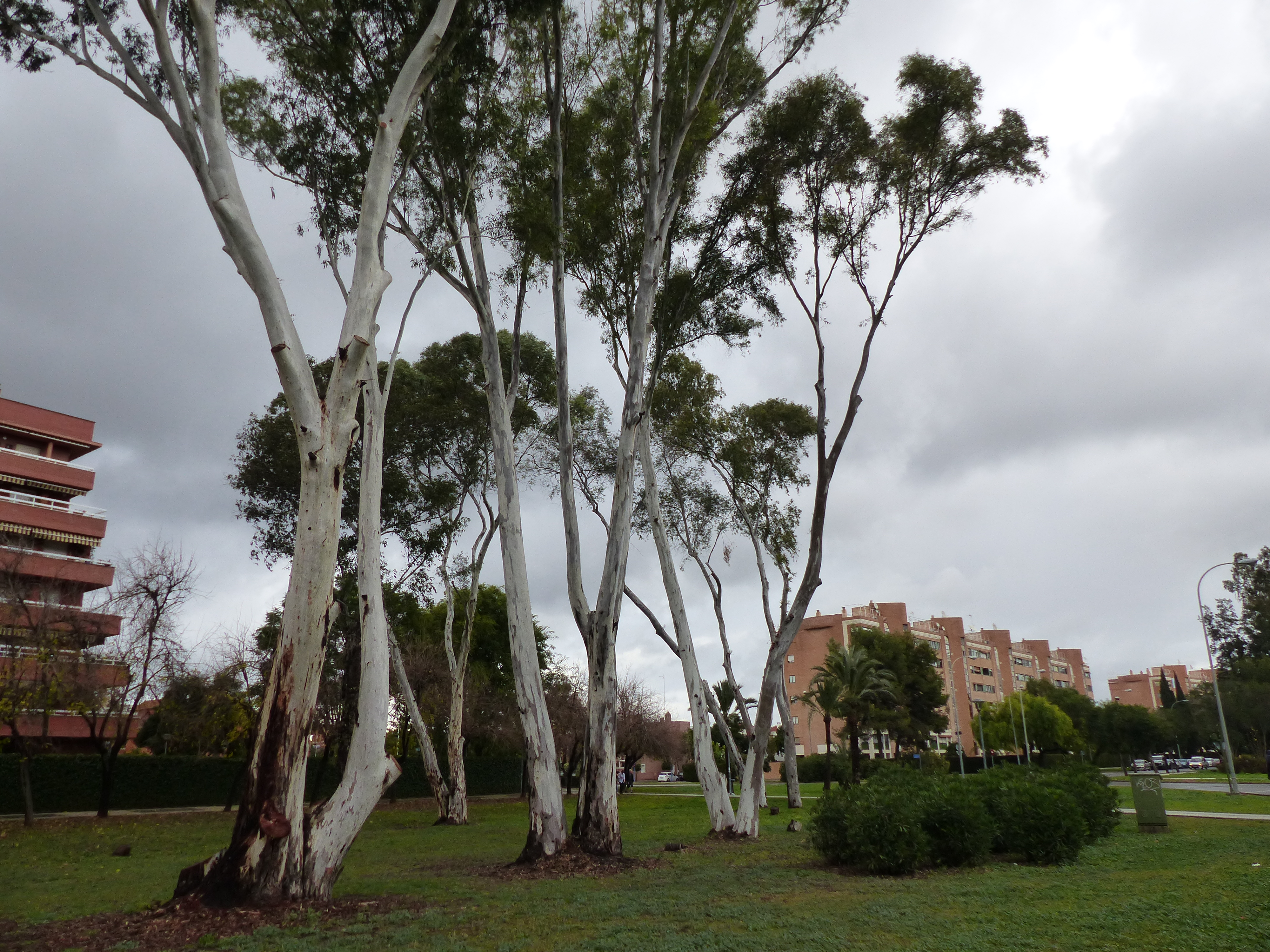 Zona verde, Sevilla Este